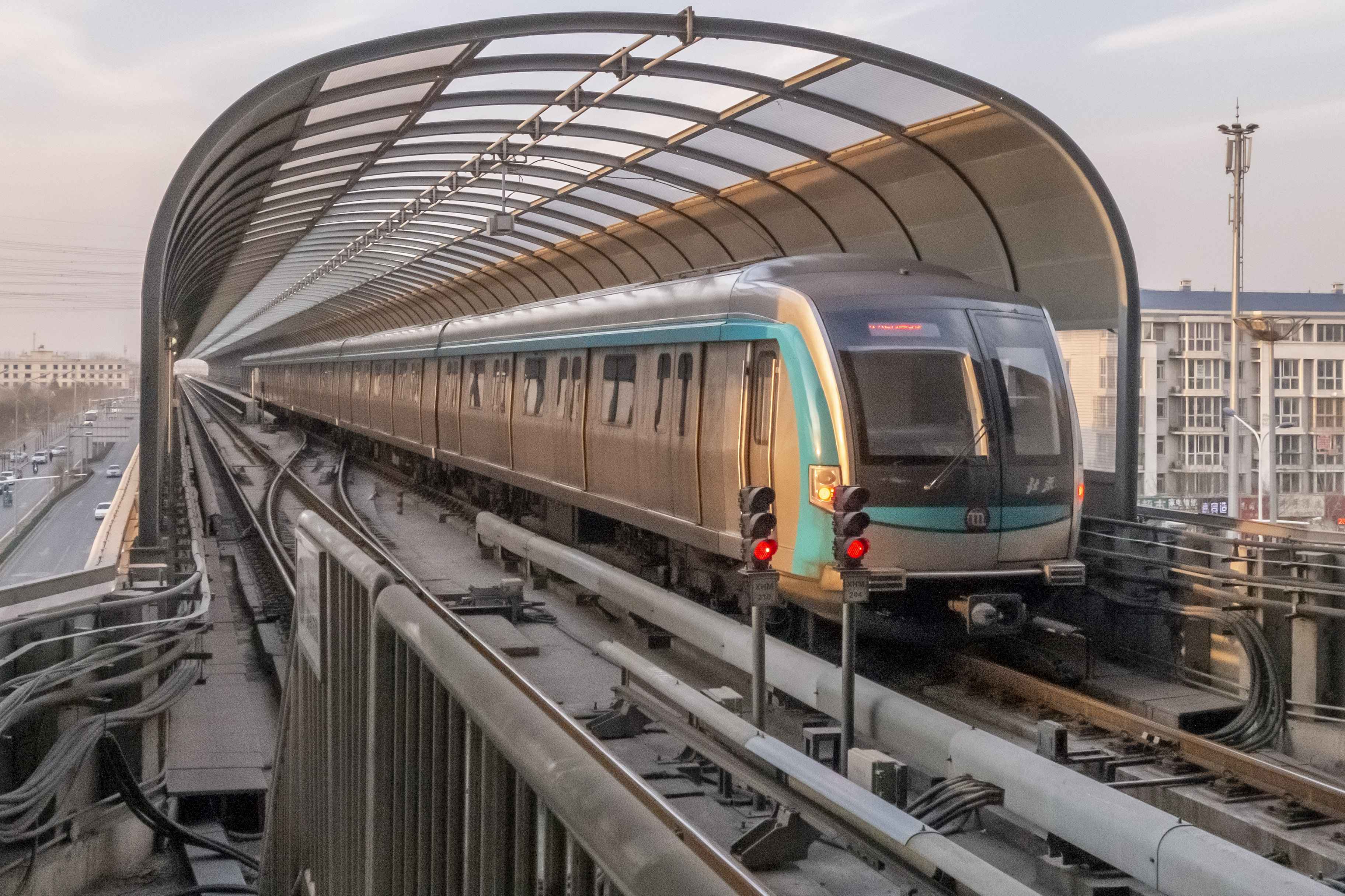 北京地铁西红门站